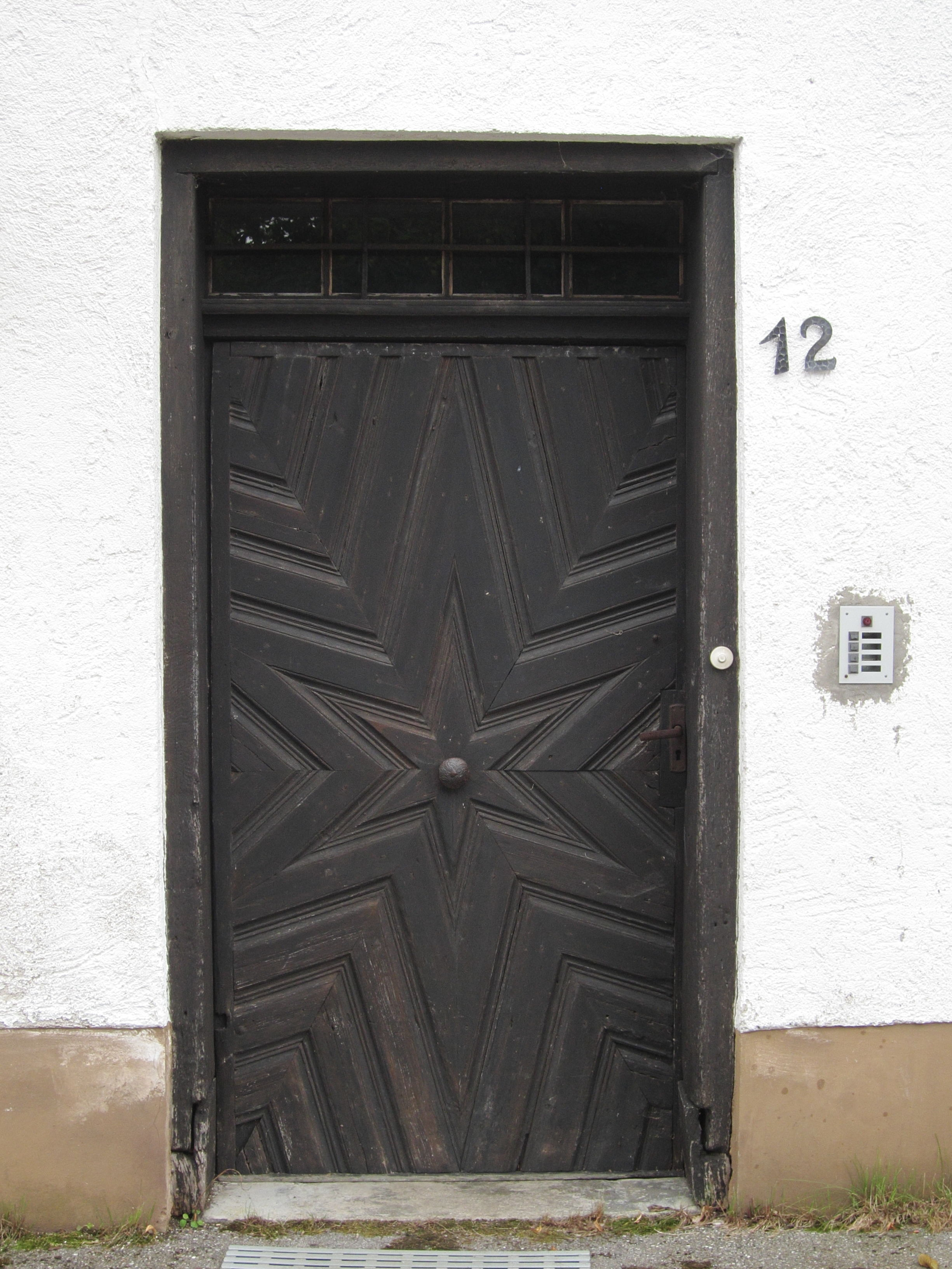 Südflügel des ehem. Hofmarkschlosses Ottenhofen; eine der zwei aufgedoppelten Türen des 18. Jahrhunderts.